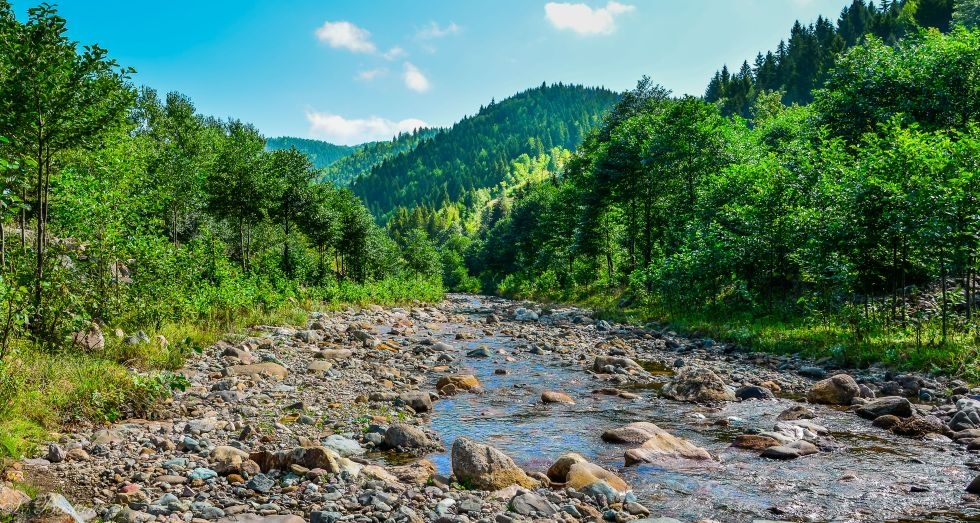 Kalınçam Vadisi boyunca akan Fol Deresi onu kuşatan yoğun bitki örtüsü.